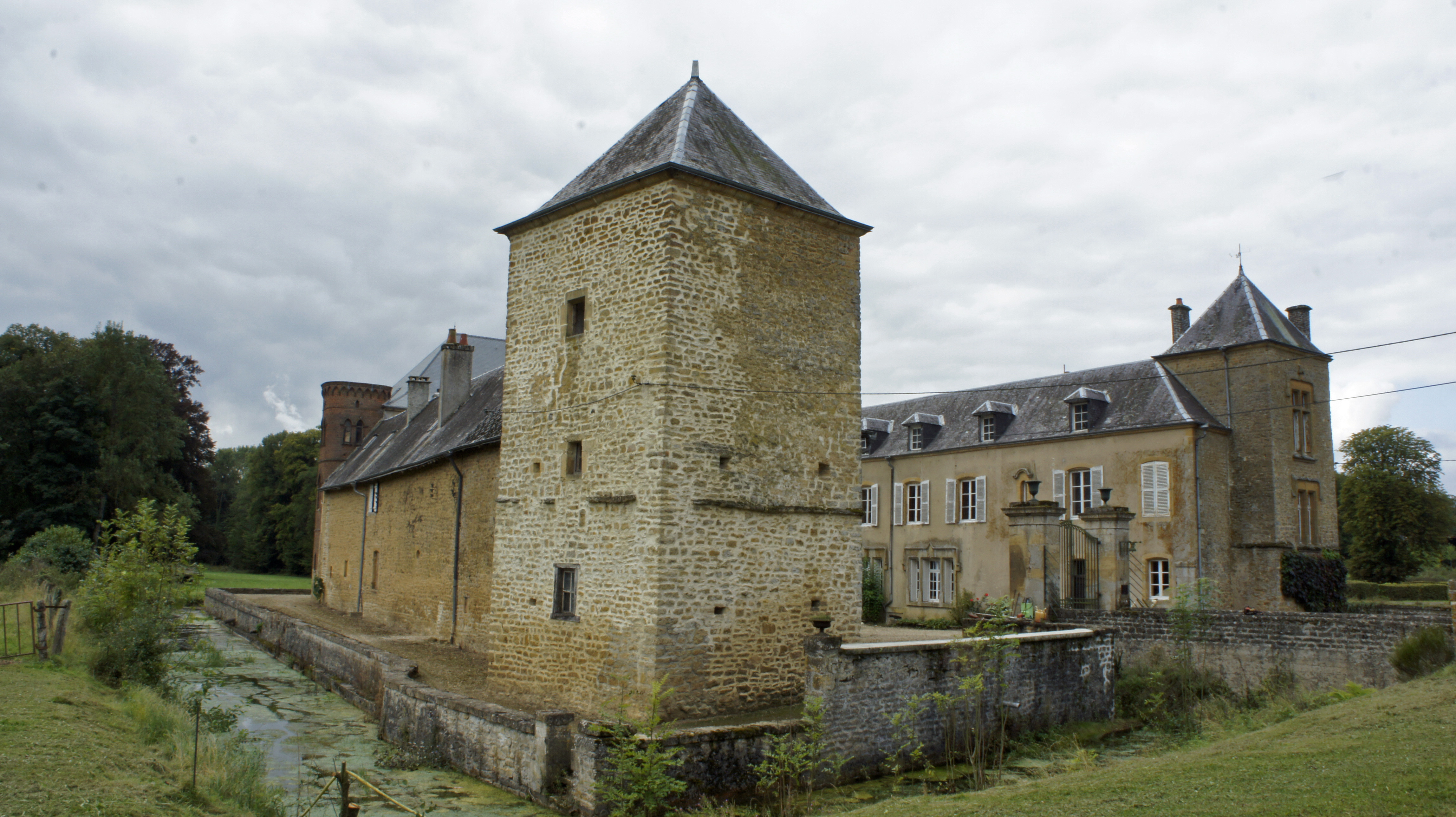 Vue du Château des douves et du_Temple.